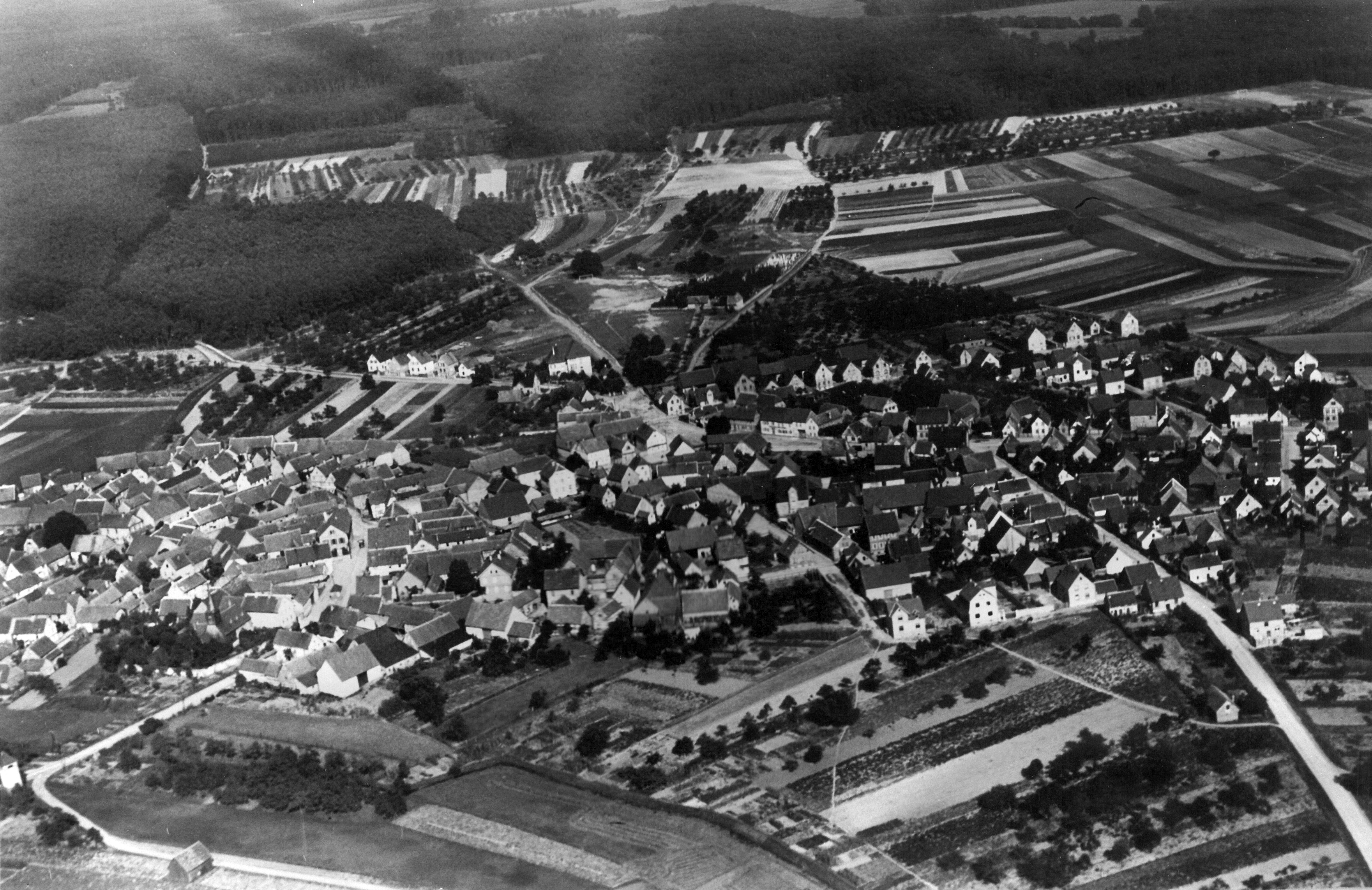 Luftaufnahme von Königstädten im Jahr 1926